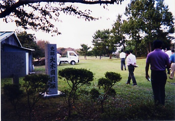 大木囲貝塚の入り口。投稿者自ら撮影 Daigigakoi Shell Mound, Shichigahama, Miyagi, Japan Category:史跡の画像 Category:宮城県の画像